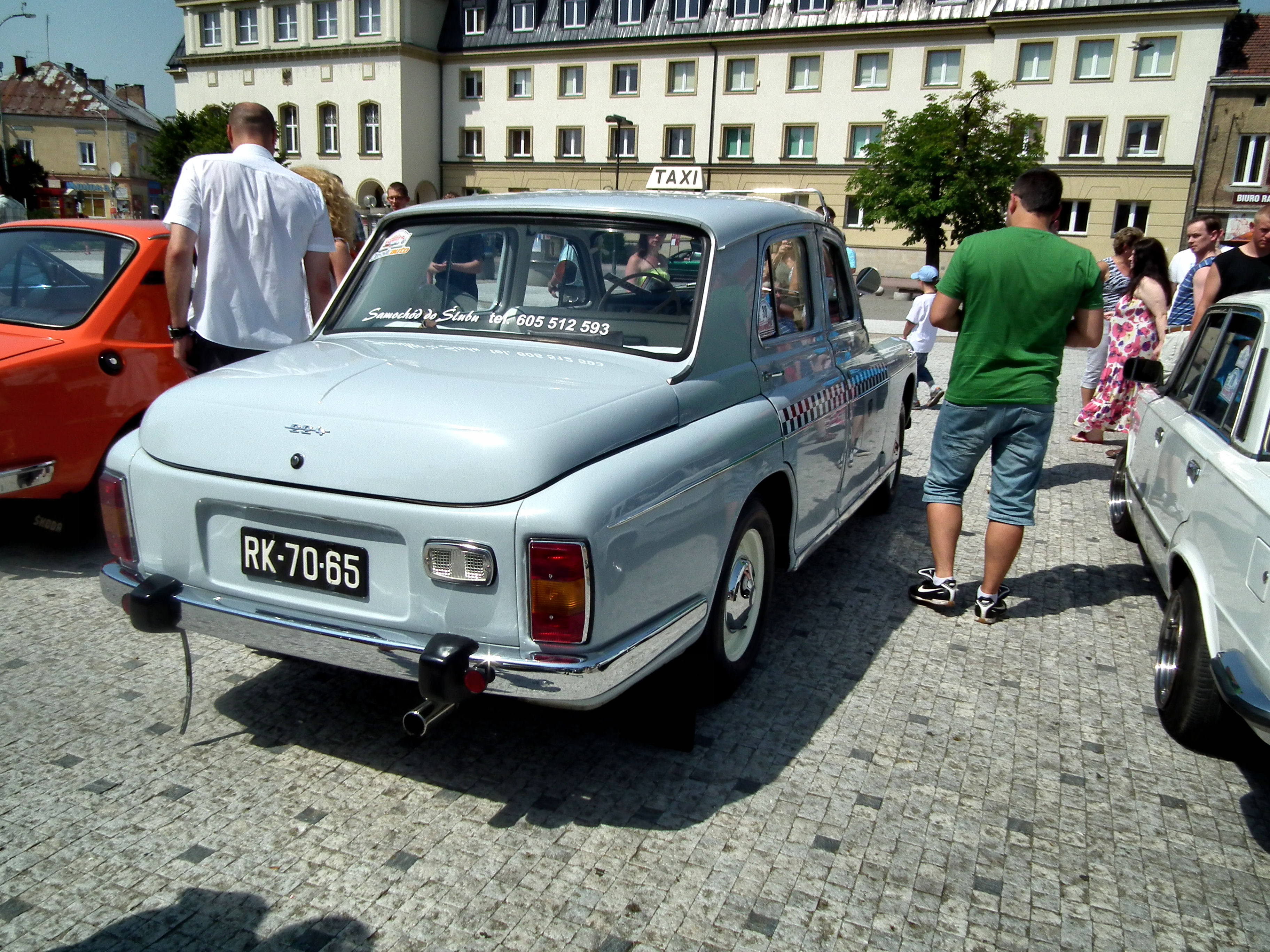 FSO Warszawa 224 w Jaśle.